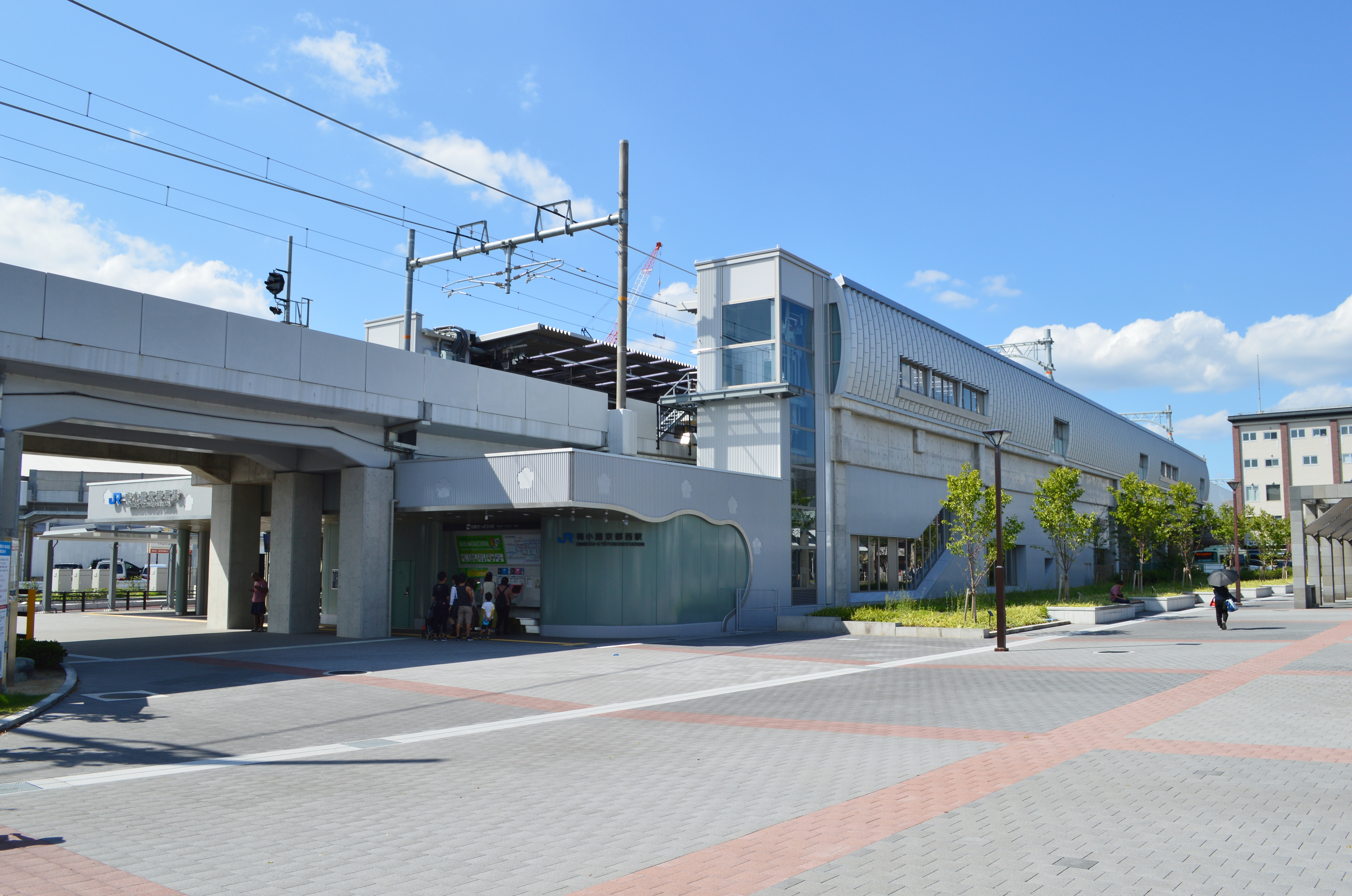 梅小路京都西駅 駅舎